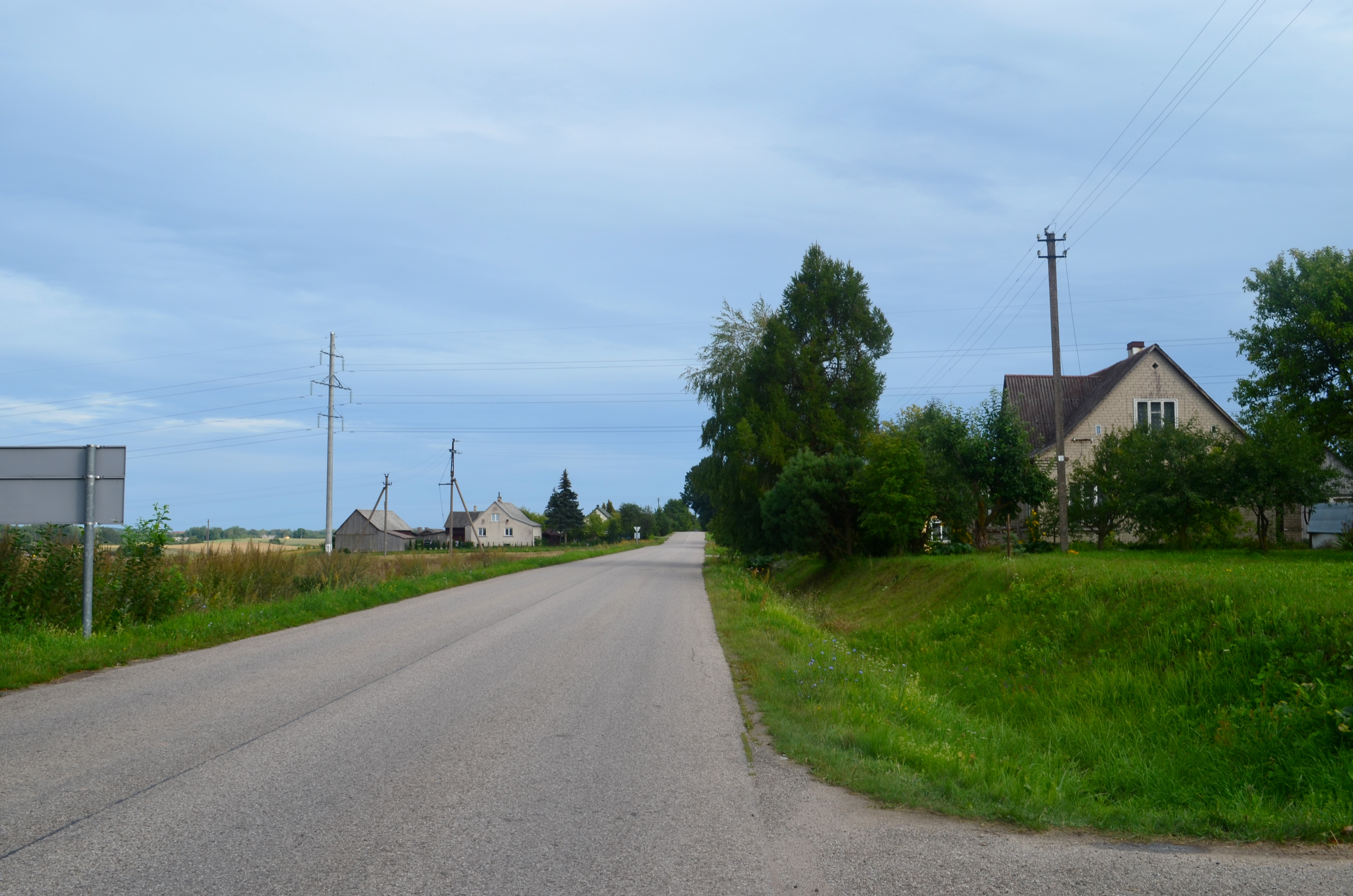 Vartai, Prienų raj.